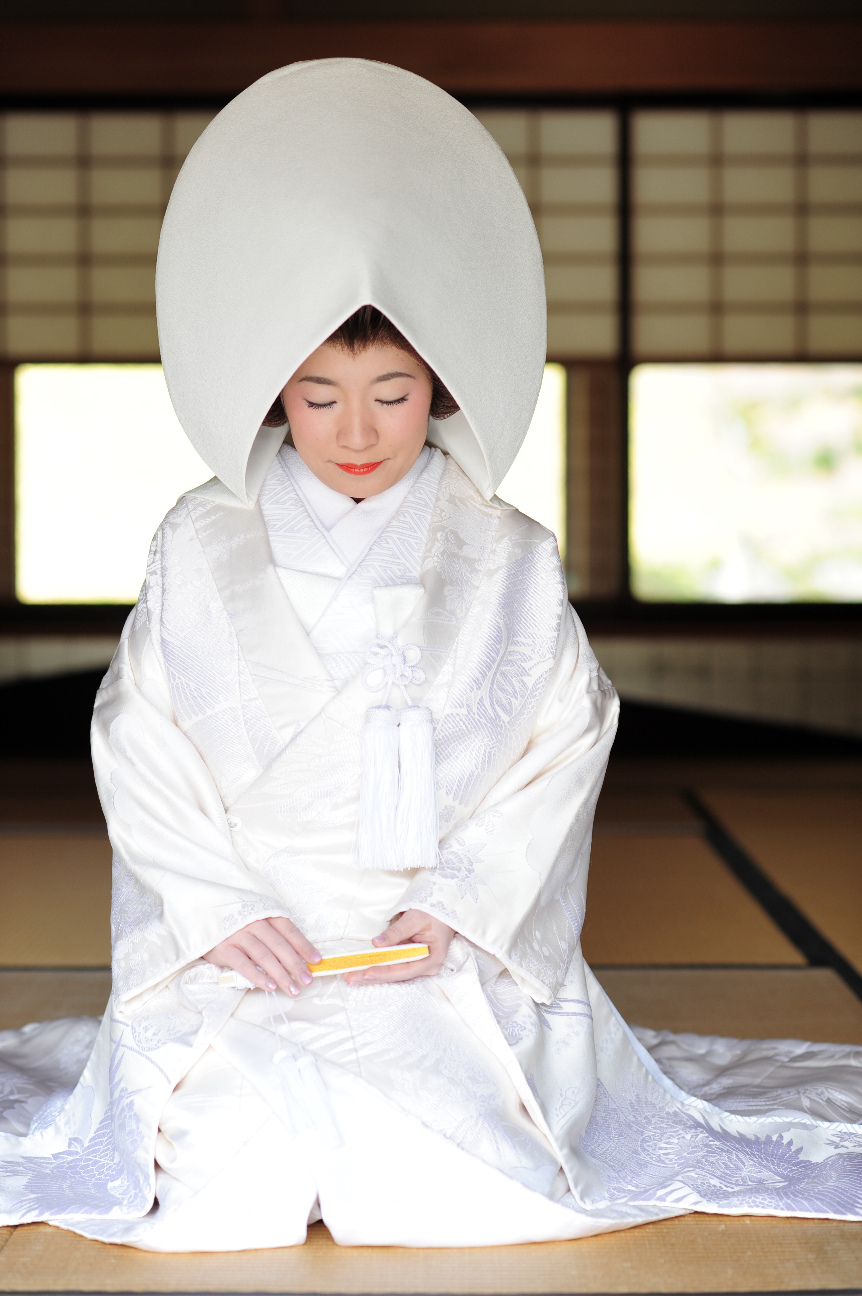 Wedding Kimono